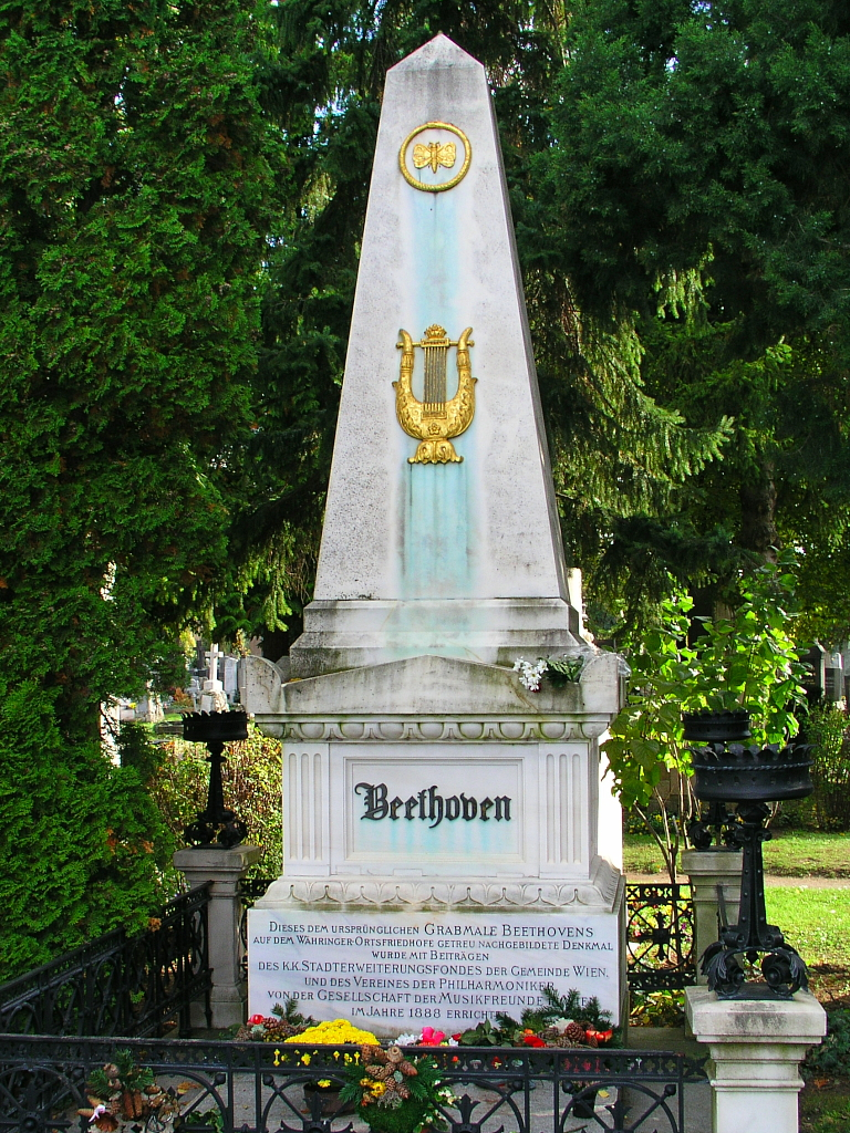 Beethoven Grabmal Wien